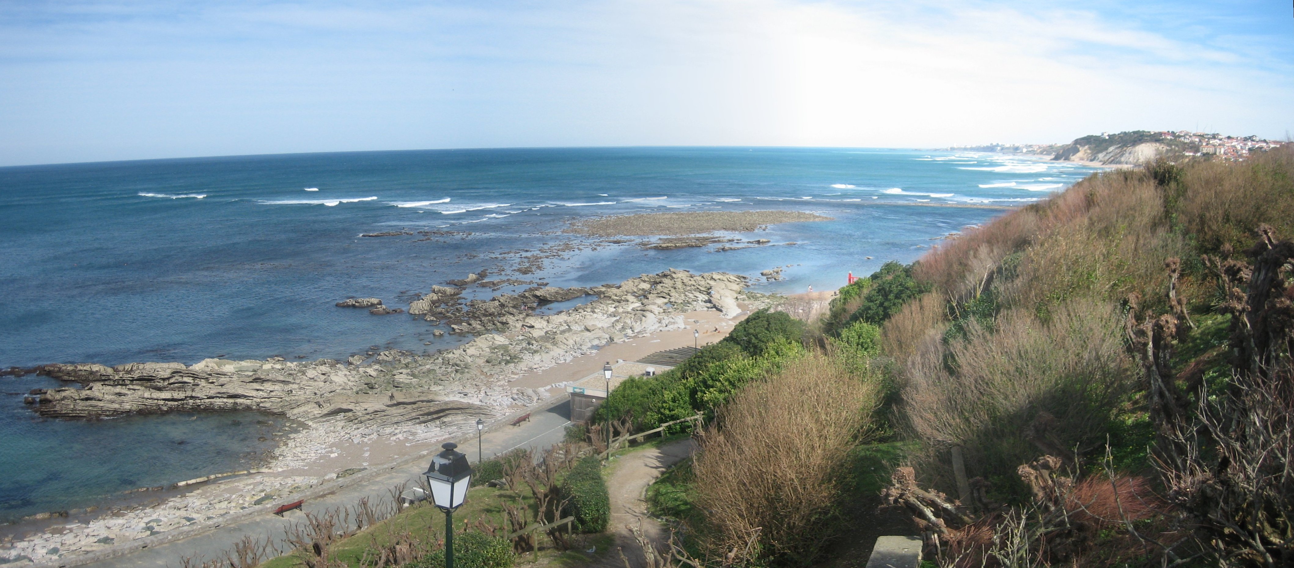 Panoramique de Parlementia depuis la terrasse du Dimanche 3 Mars 2007.